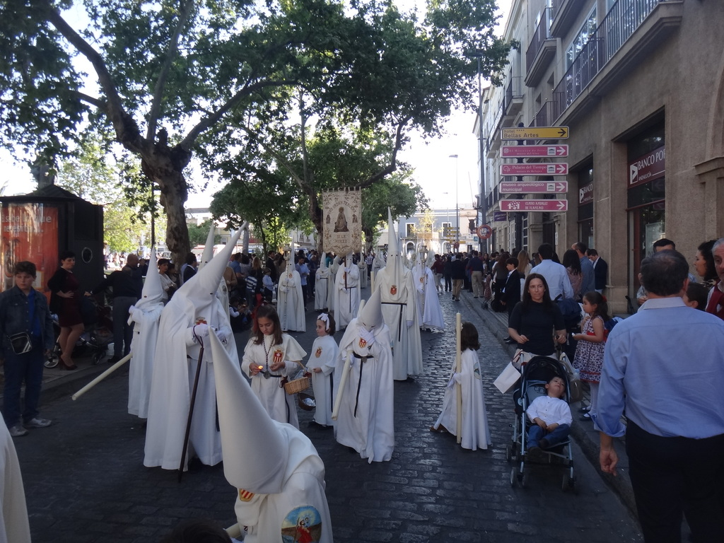 Semana Santa Jerez 2014 (Andalucía)